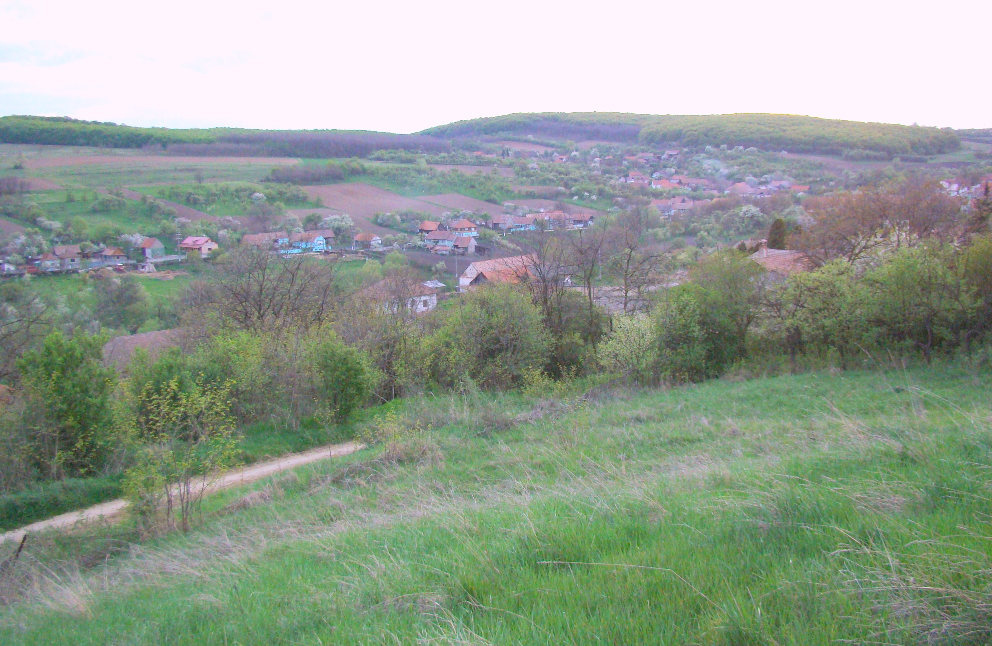 Vingard, Alba / Weingartskirchen, Transilvanien, Rumänien